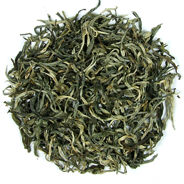 Herbata biała Fujian White